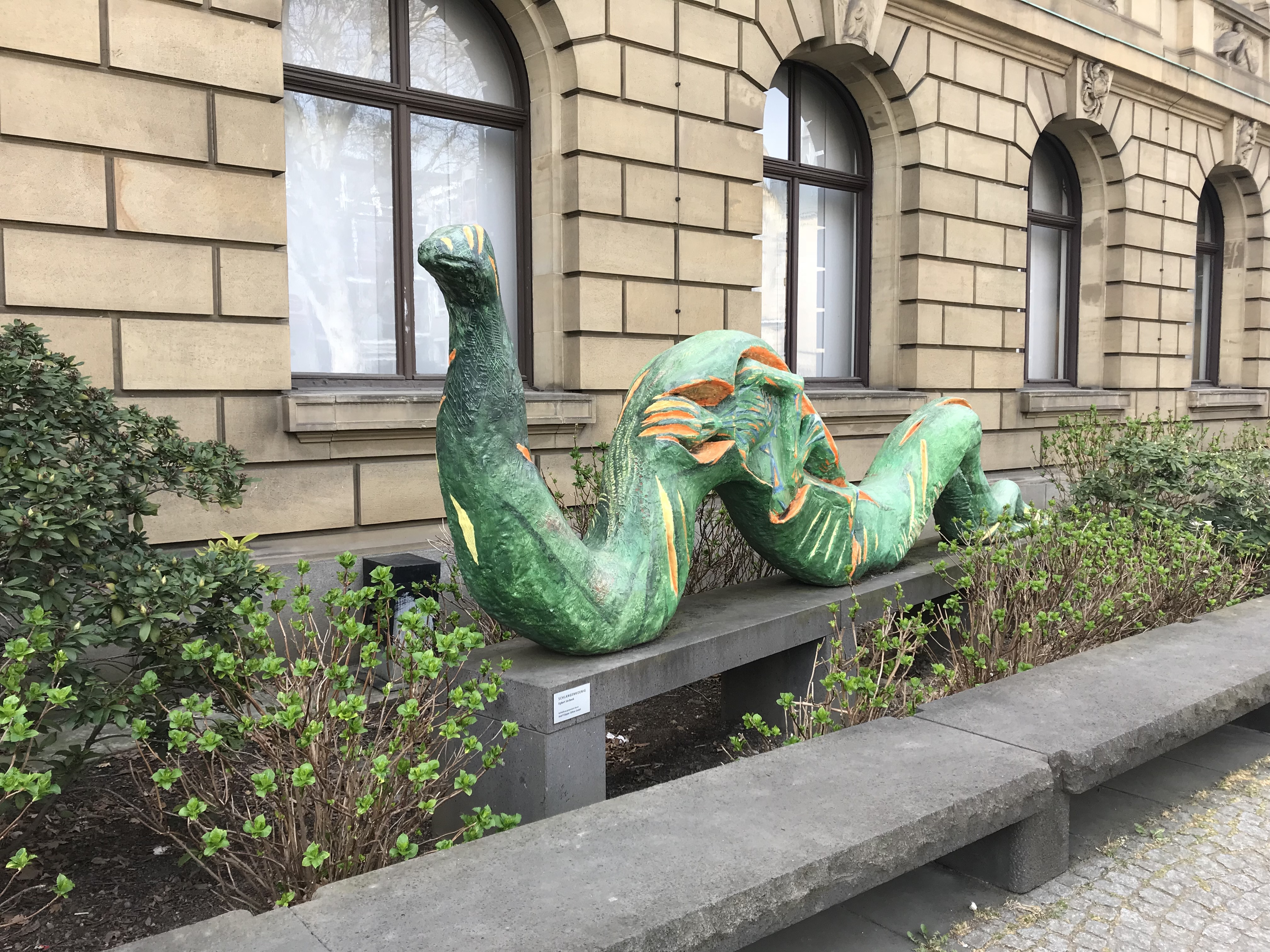 Skulptur aus Fiberglas mit einer Länge von 6,35 Metern vor dem Forschungsmuseum Alexander Koenig in Bonn.